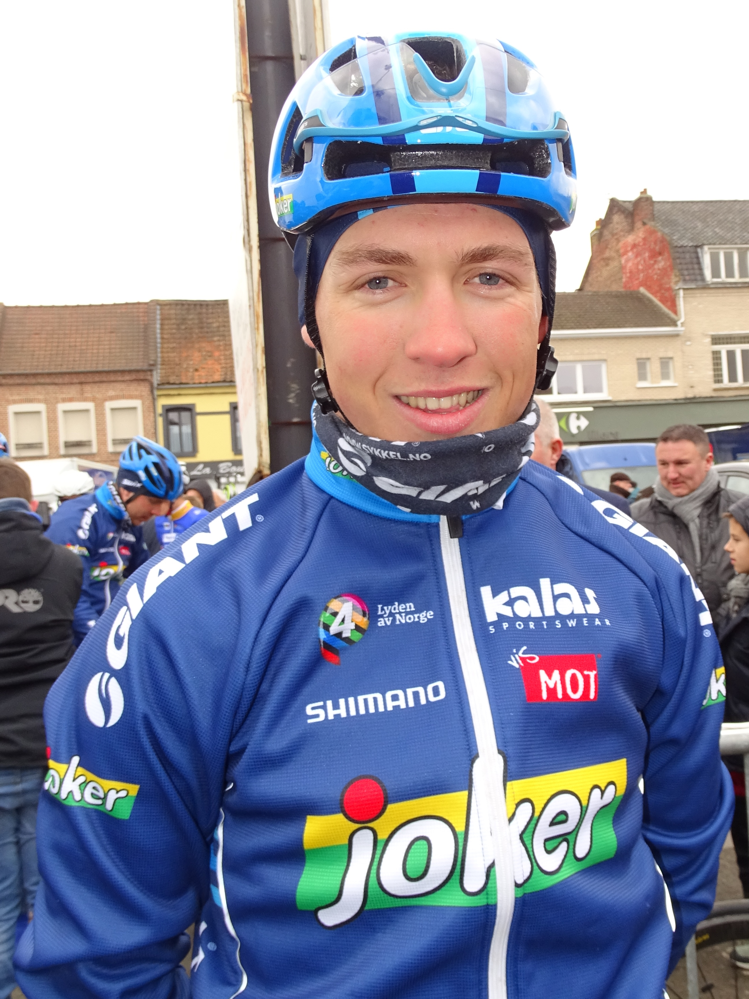 Reportage réalisé le dimanche 6 mars à l'occasion du départ et de l'arrivée du Grand Prix de Lillers-Souvenir Bruno Comini 2016 à Lillers, Pas-de-Calais, Nord-Pas-de-Calais, France.